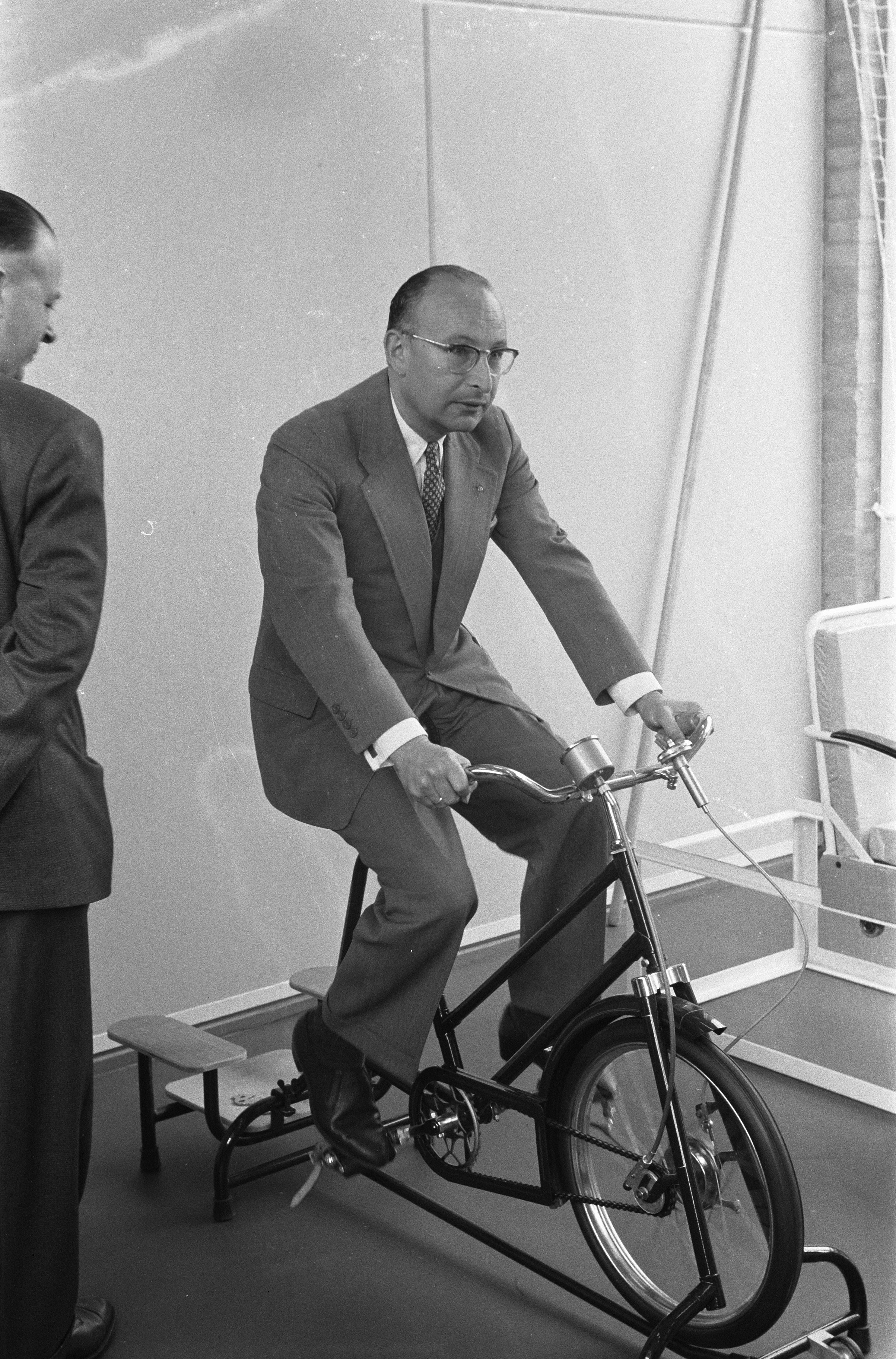 Collectie / Archief : Fotocollectie Anefo Reportage / Serie : [ onbekend ] Beschrijving : Wethouder van Gezondheid en Ziekenhuiswezen mr. R. van de Bergh opent in het Oosterpark te Amsterdam het nieuwe revalidatiecentrum Datum : 16 mei 1960 Locatie : Amsterdam, Noord-Holland Trefwoorden : openingen, revalidatiecentra, wethouders Persoonsnaam : Bergh R van de Fotograaf : Pot, Harry / Anefo Auteursrechthebbende : Nationaal Archief Materiaalsoort : Negatief (zwart/wit) Nummer archiefinventaris : bekijk toegang 2.24.01.05 Bestanddeelnummer : 911-2593